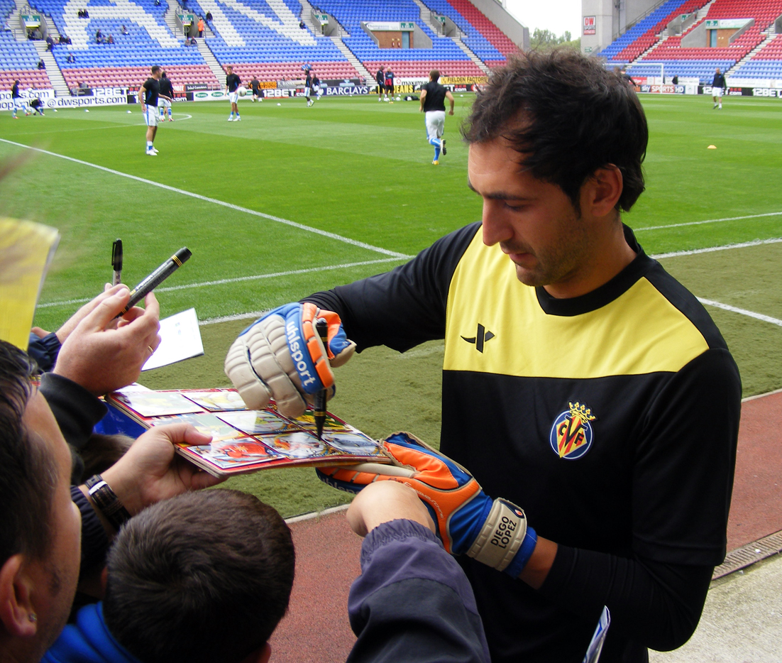 Diego Lopez of Villarreal